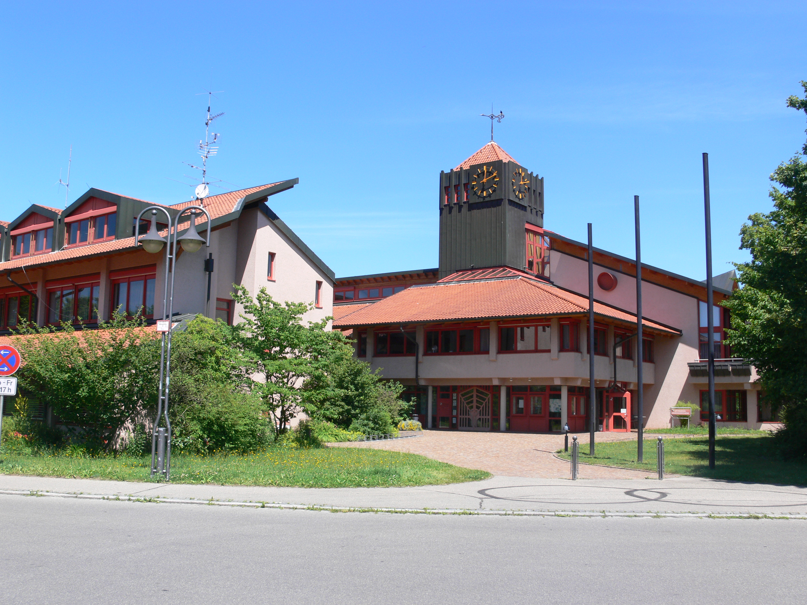 Meckenbeuren, Bodenseekreis, Baden-Württemberg Rathaus der Gemeinde Meckenbeuren im Ortsteil Buch